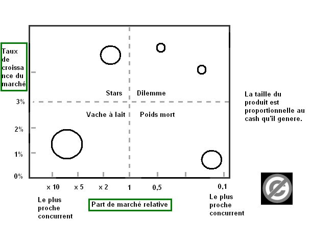 Schéma de la matrice BCG. je suis l'auteur de ce schema, les droits sont donc dans le domaine public.